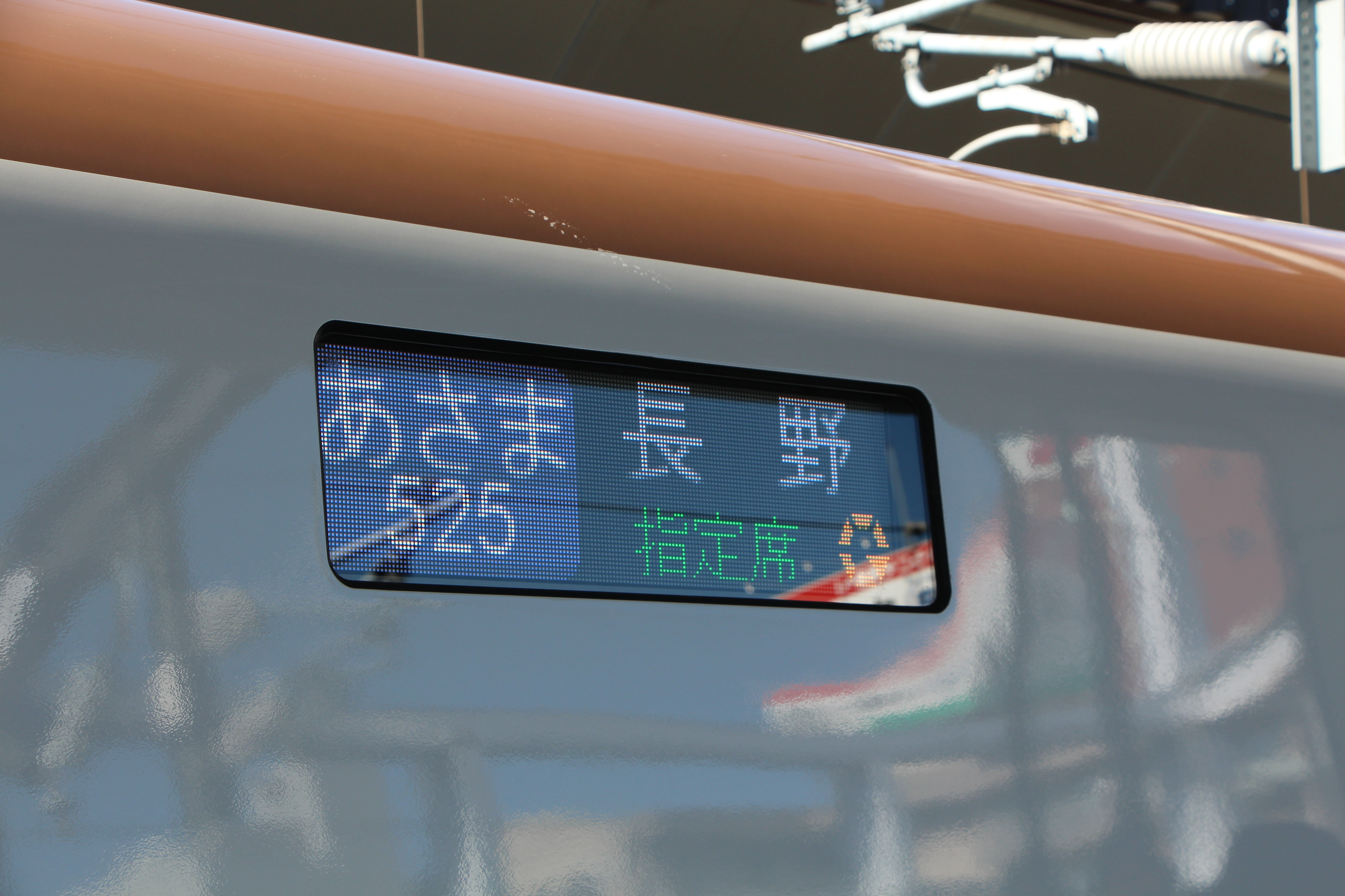 E7系-電光式方向幕